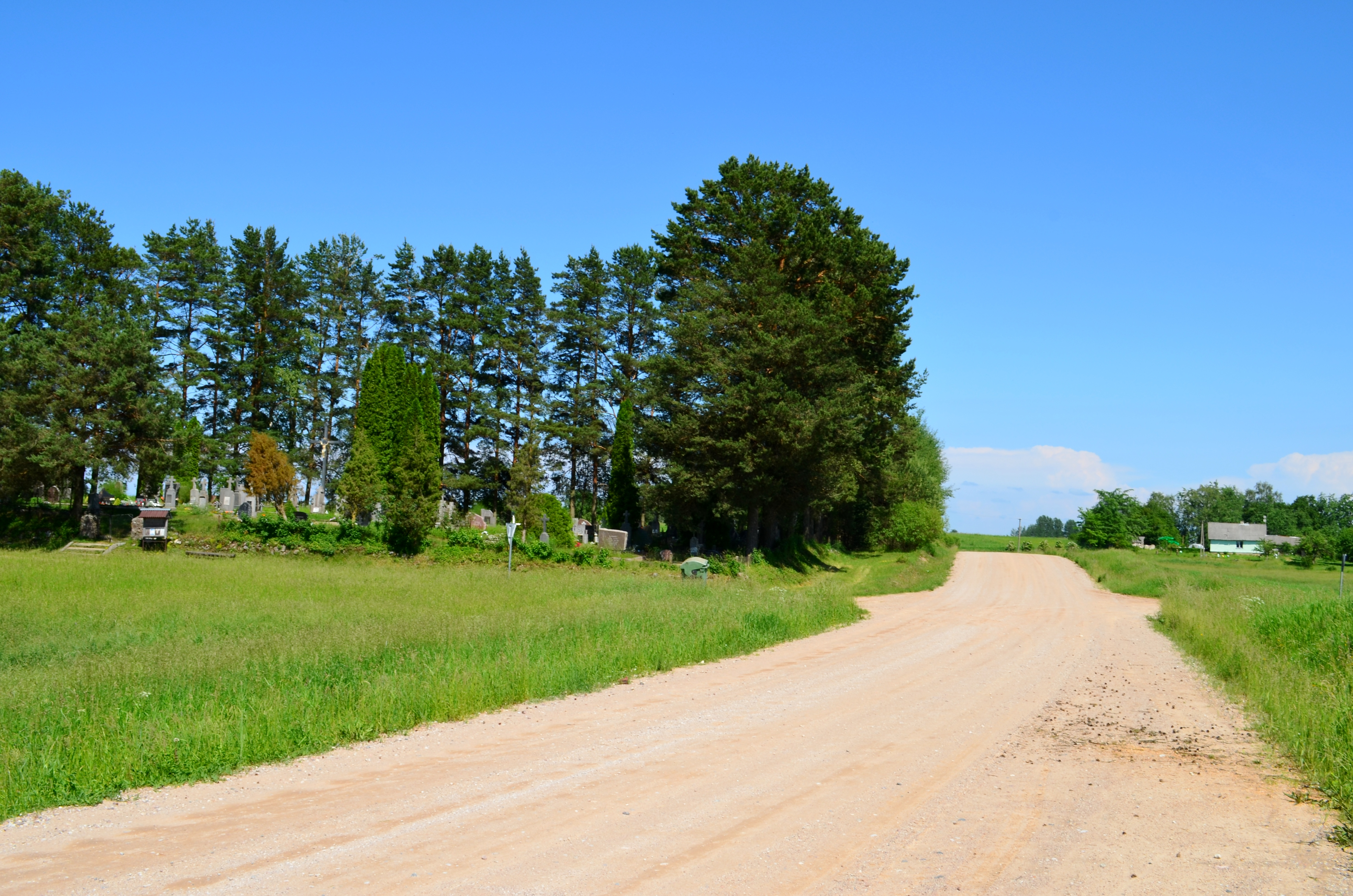 Rudžių kapinės, Ignalinos r.